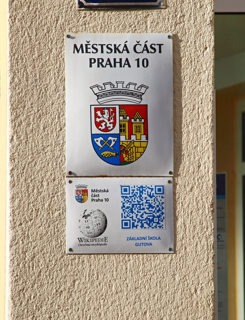 ZŠ Gutova